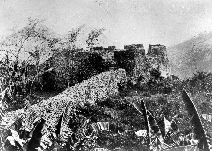 Repronegatief. Bastion van de kraton Bolyol, gebouwd onder leiding van de V.O.C.